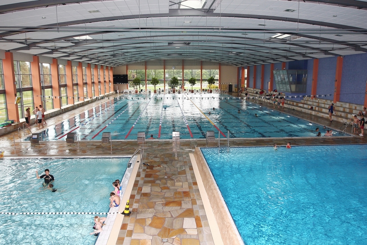 Deitsch: Sport-, Nichtschwimmer- und Sprungbecken